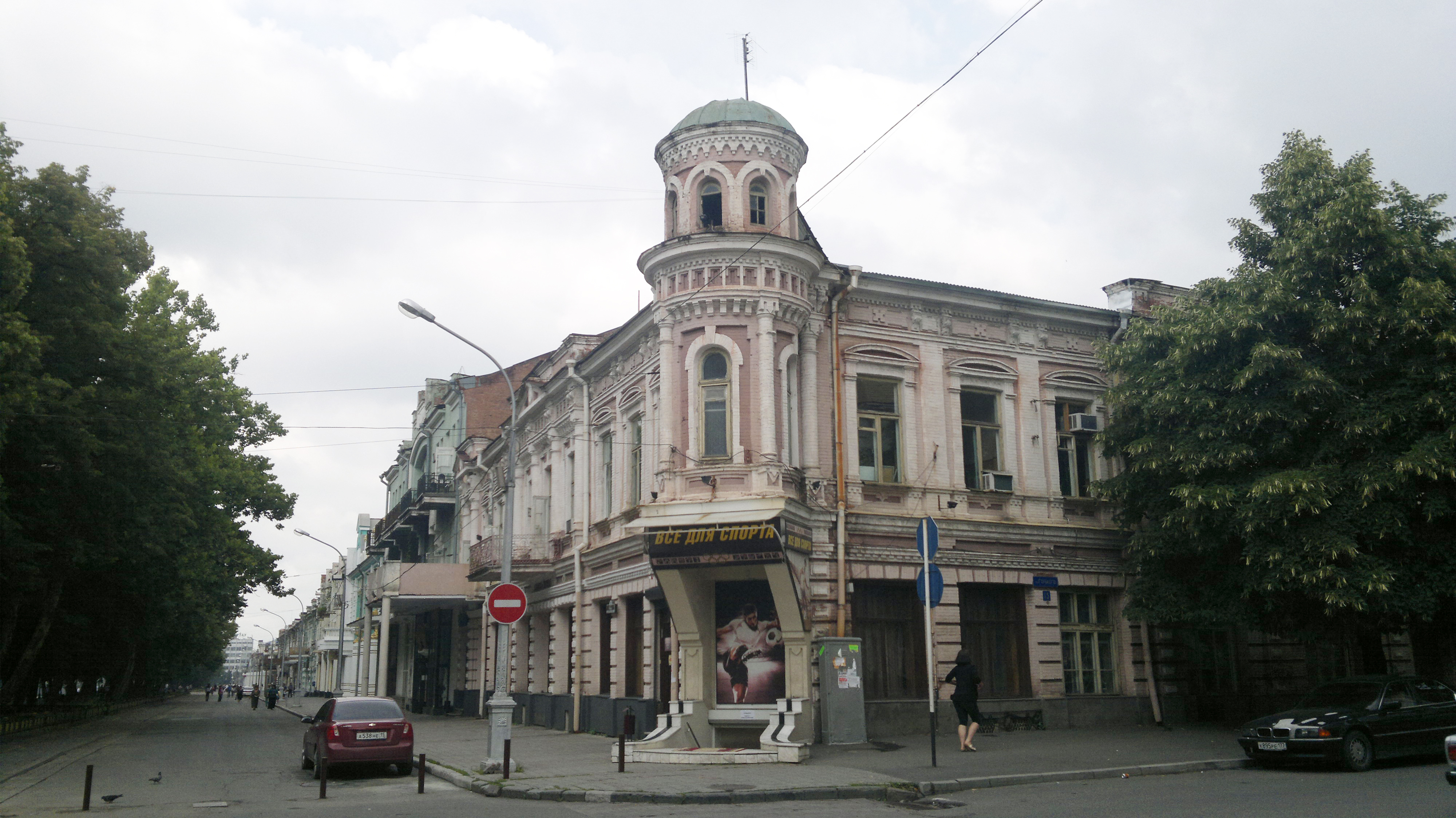 проспект Мира (Владикавказ)